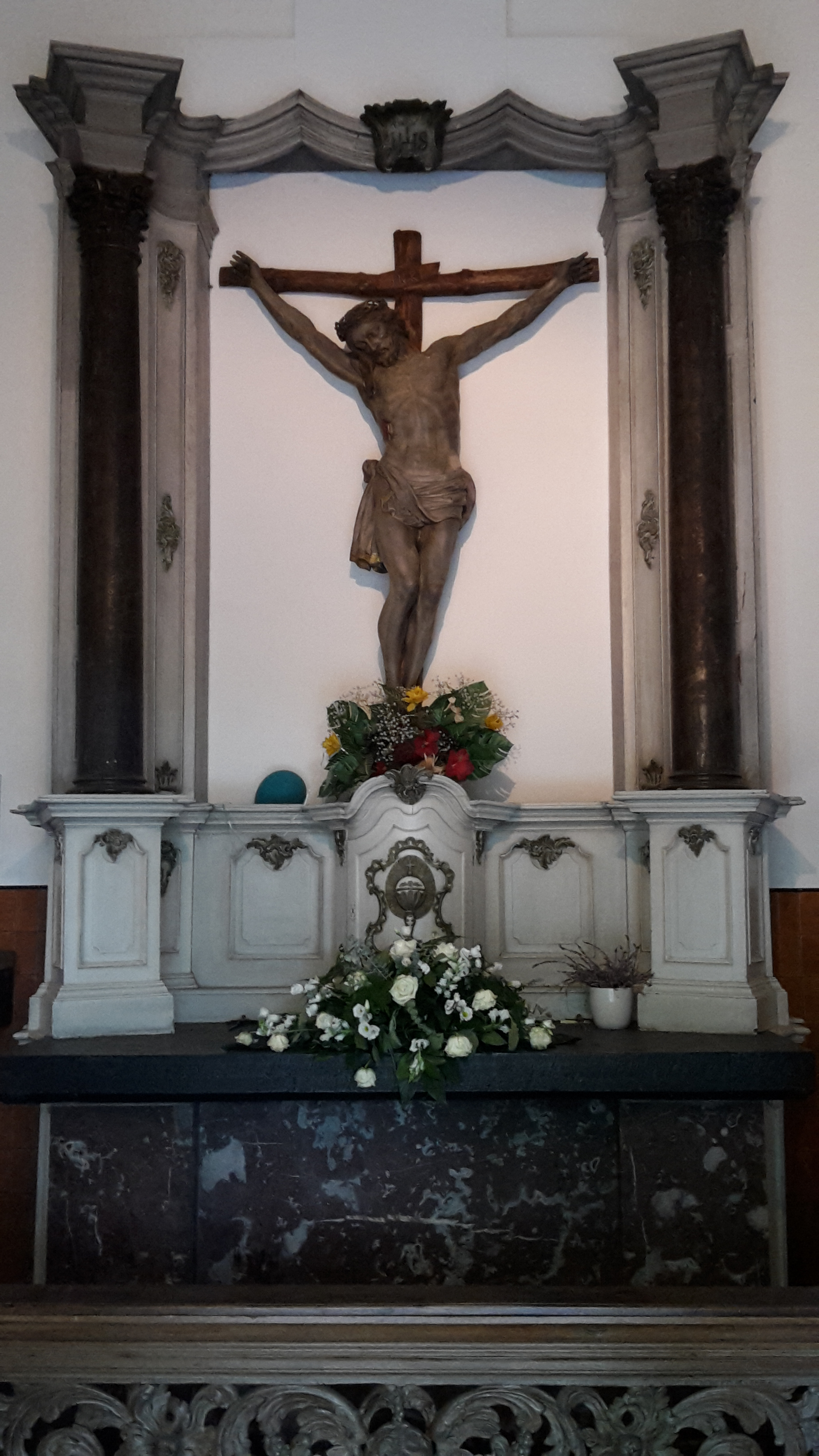 Houten barok-altaar met kruisbeeld uit 1762, in de kruiskapel van de Genooierhof, Venlo.